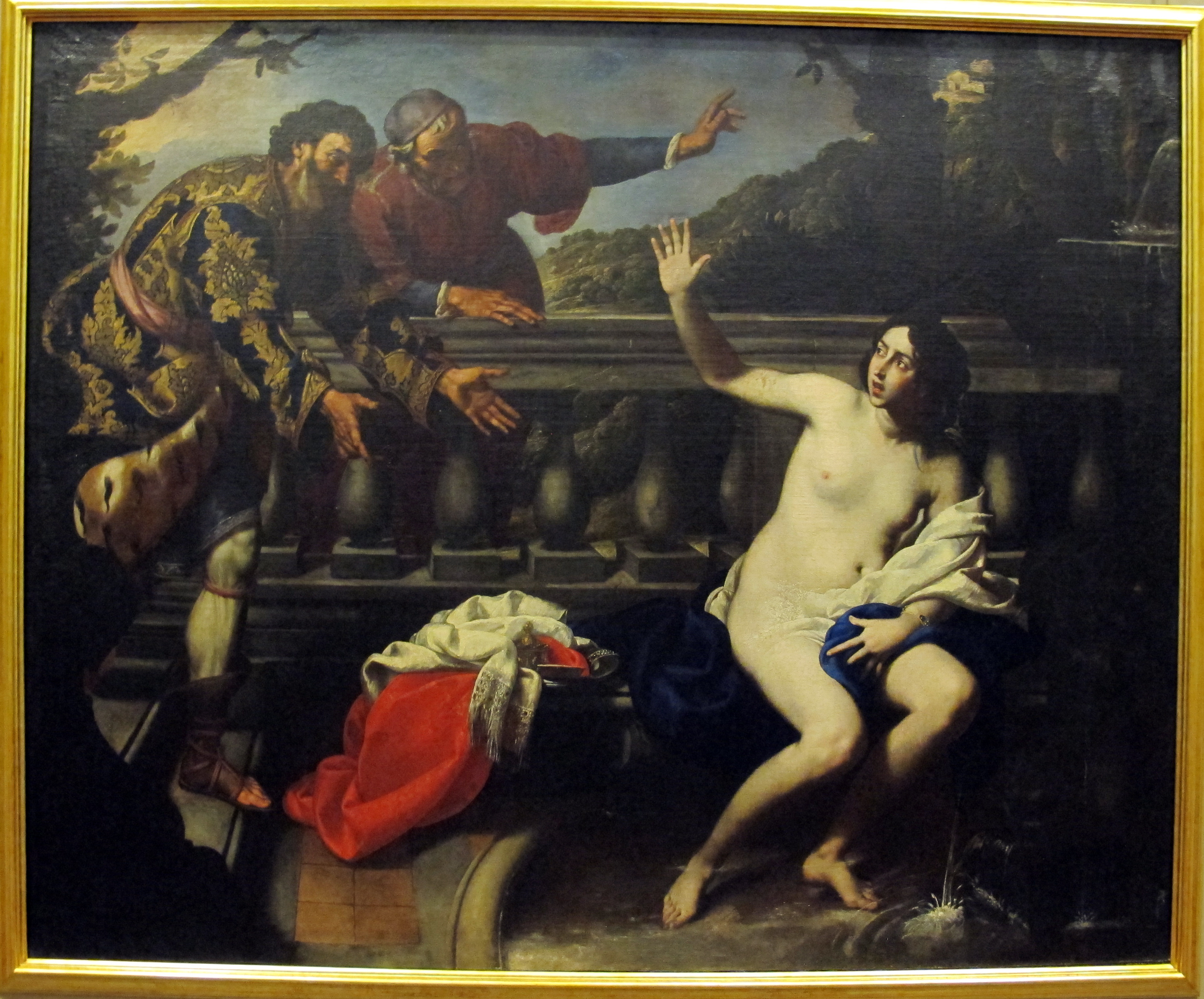 Galleria Napoletana (Museo di Capodimonte)